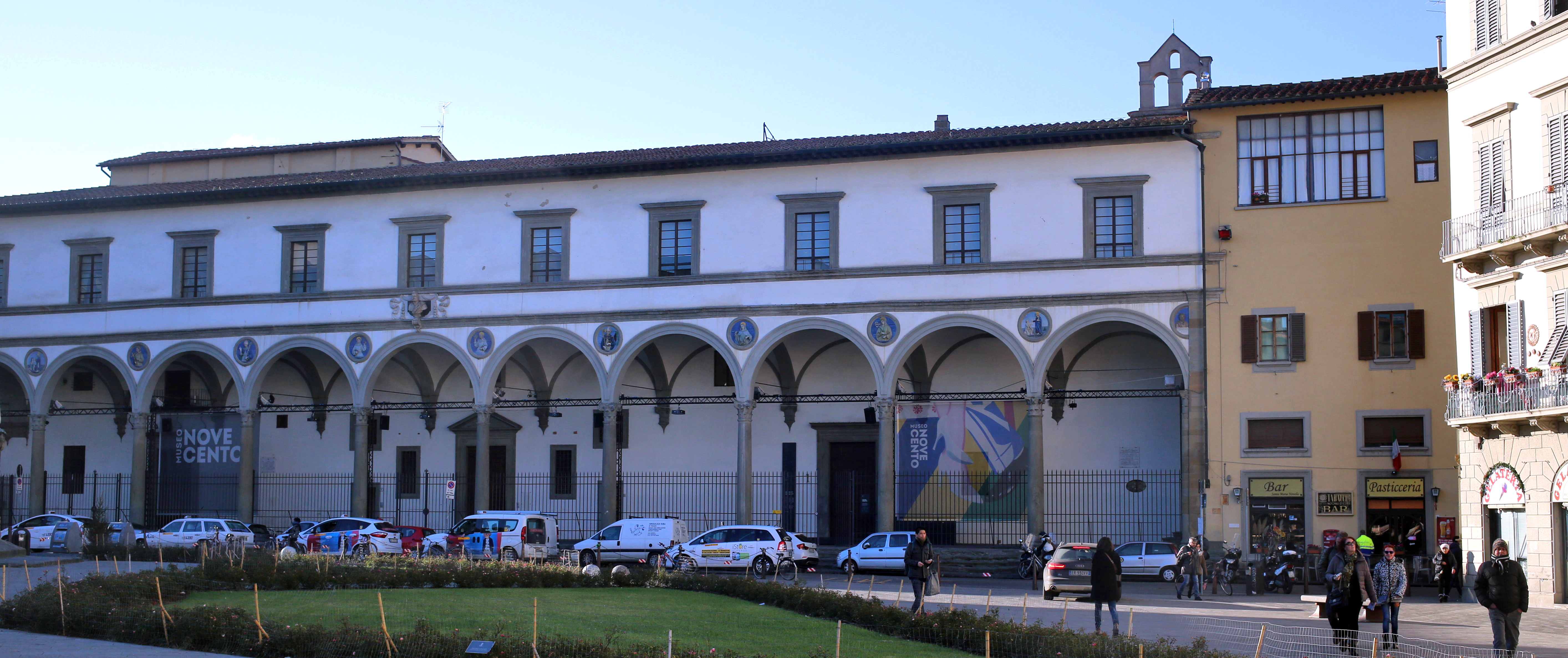 Museo Novecento, loggiato